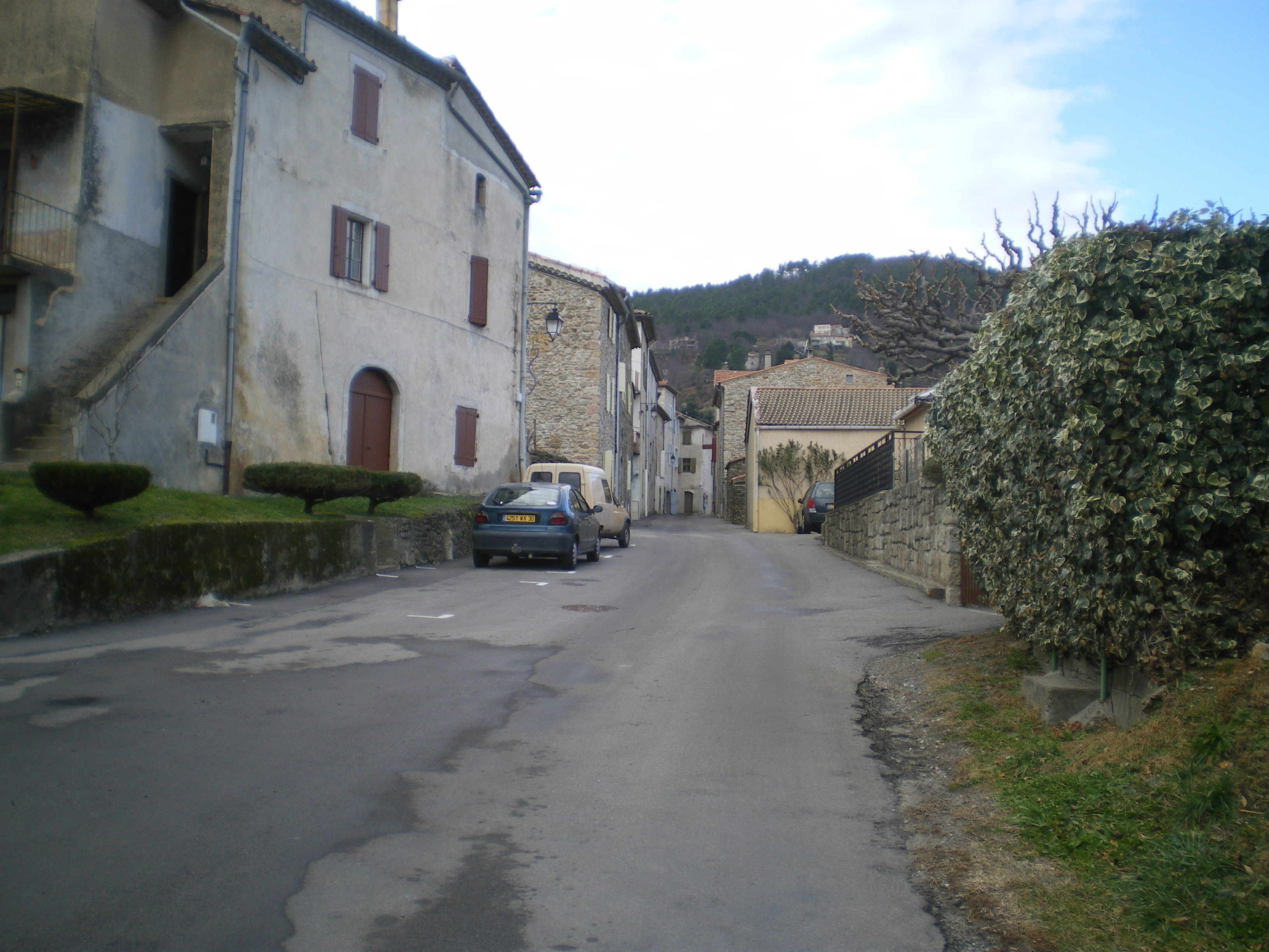 Rue principale du village de Branoux, france